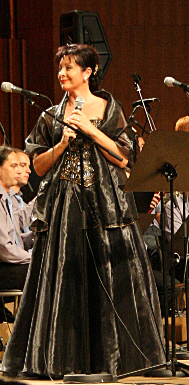 Dobrotvorni koncert "Križ nek' ti sačuva ime" u koncertnoj dvorani Vatroslav Lisinski u Zagrebu.